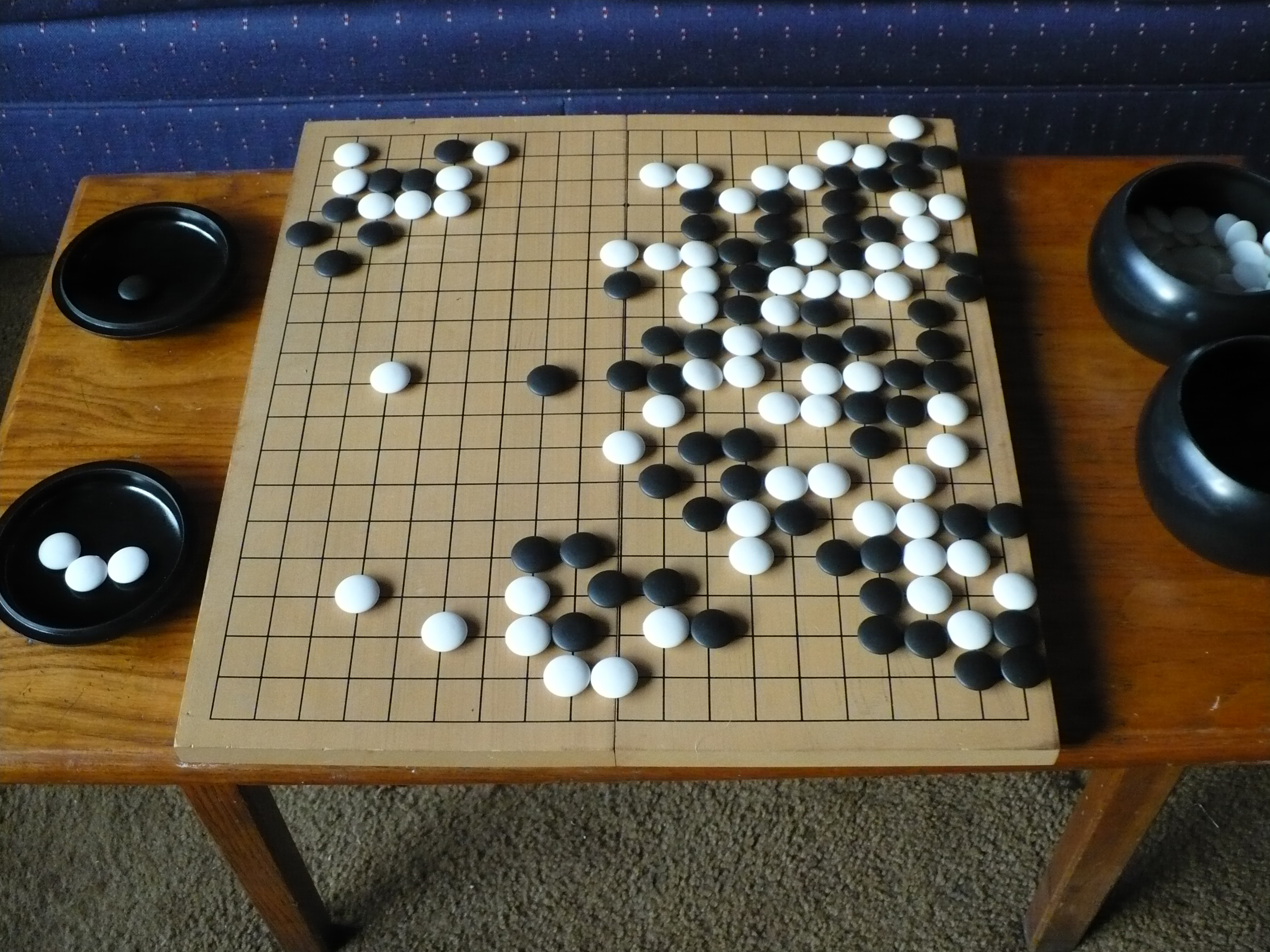 Final position of go game Katu Masao vs. Fujisawa Hideyuki March 1, 1978.